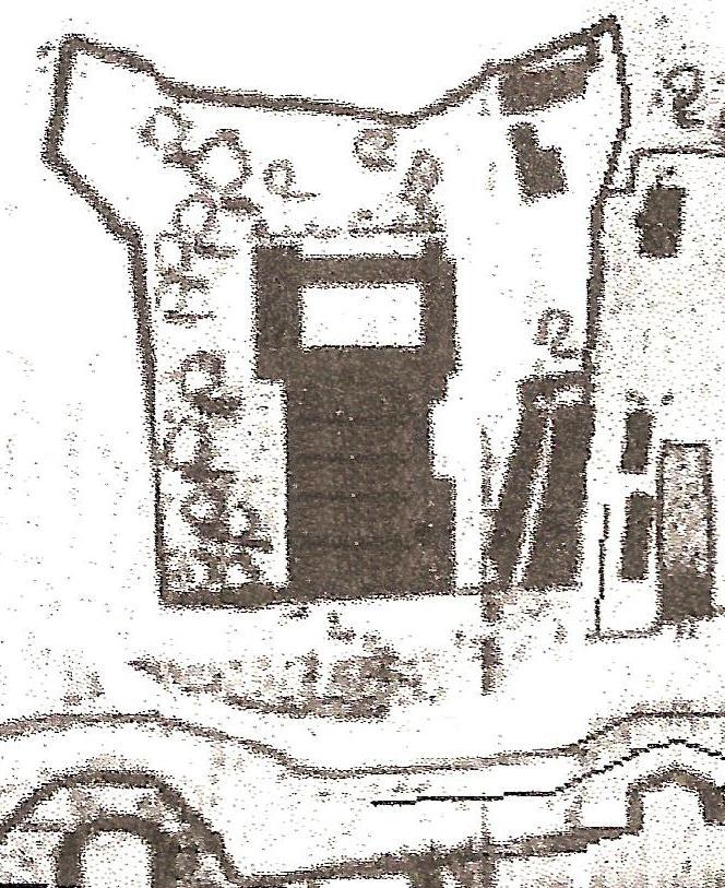 монастир кармелітів босих (фрагмент плану)